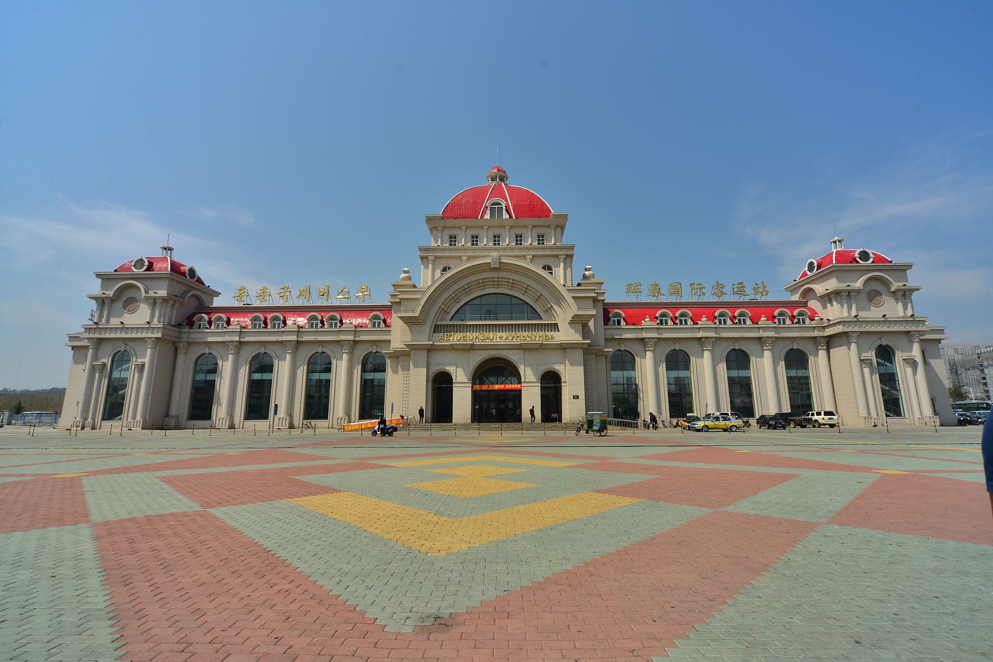 巡道工出品 photo by Xundaogong 珲春国际公路客运站